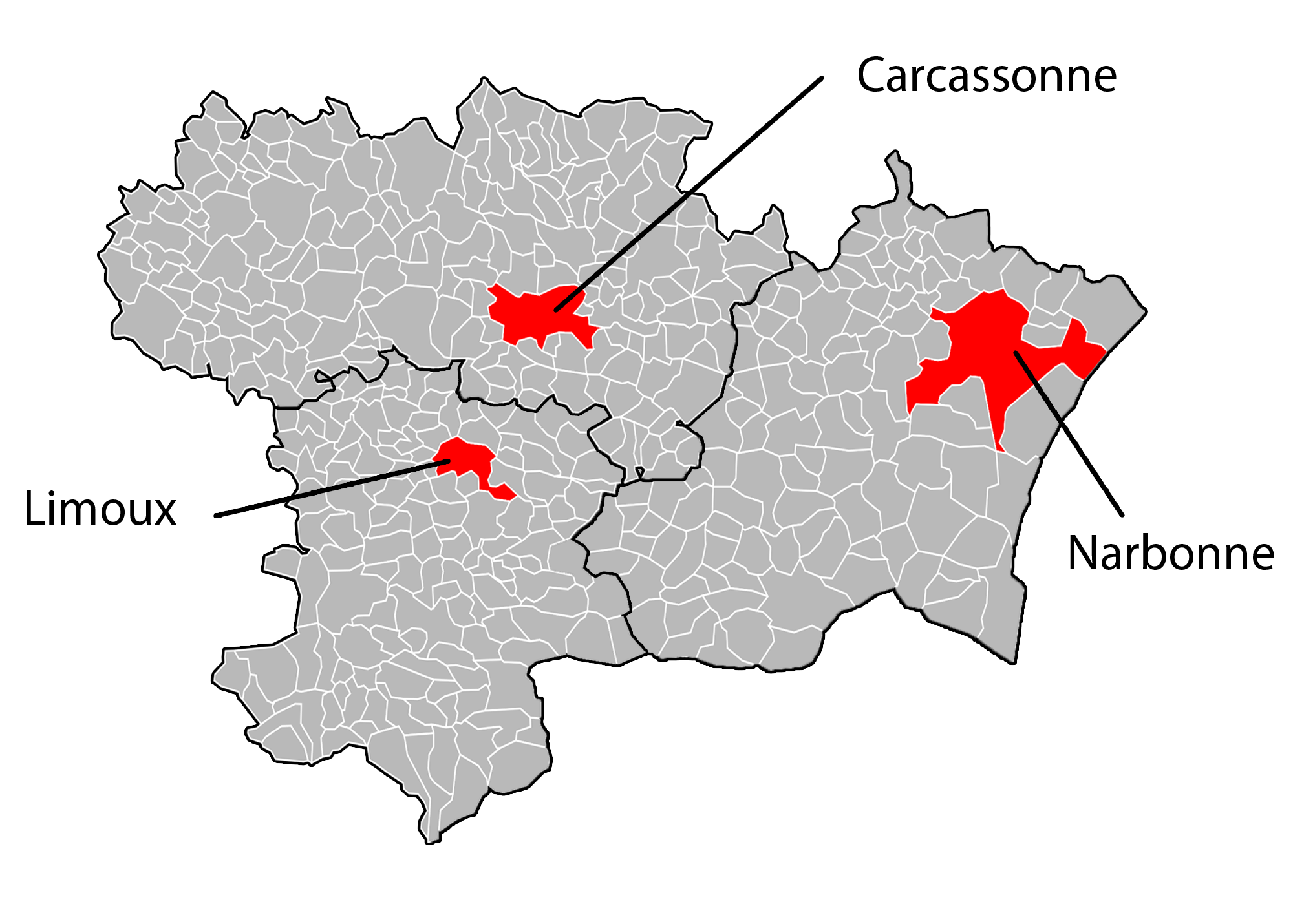 Carte des arrondissements de l'Aude